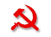 Серп и Молот